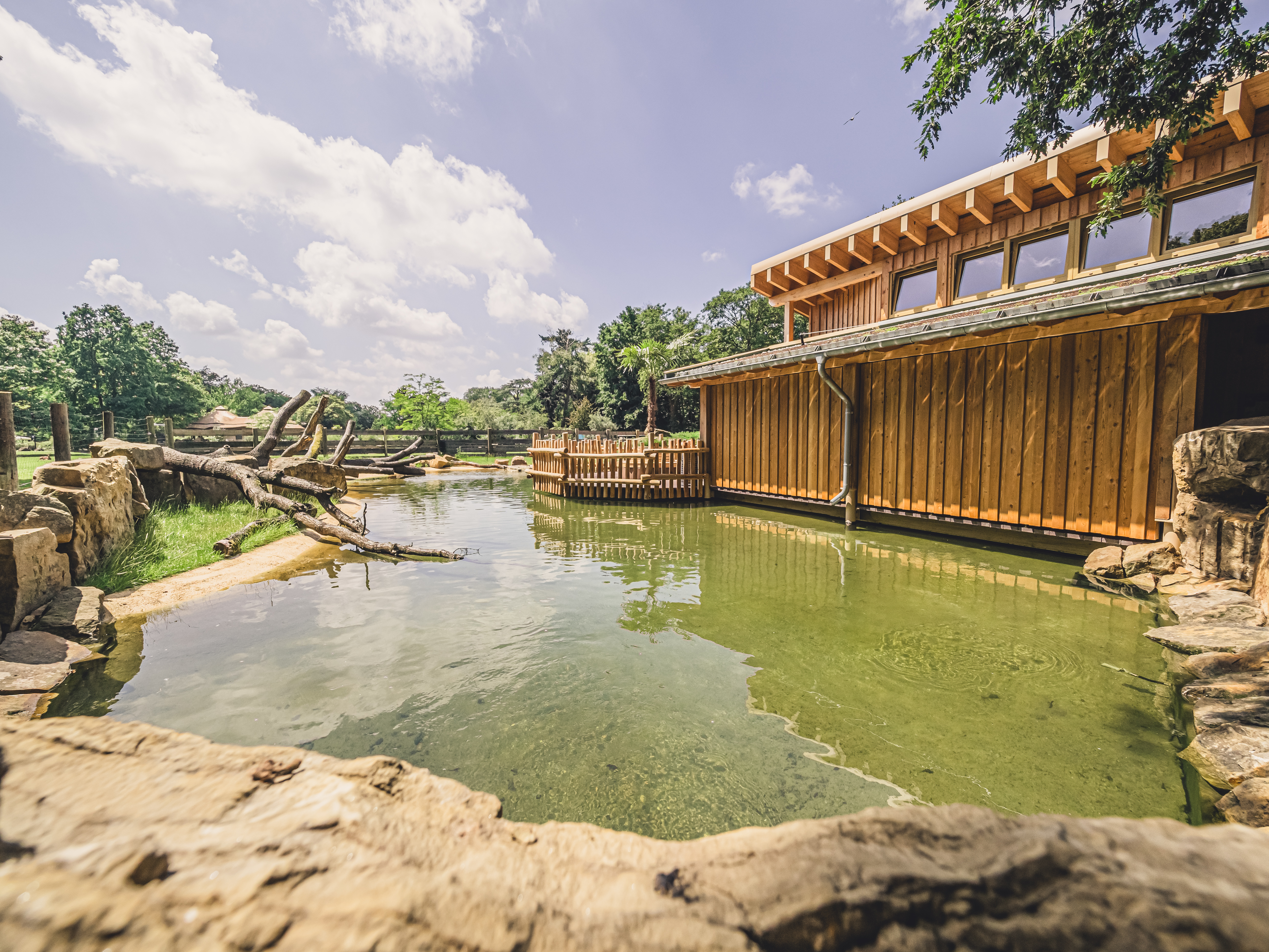 PelikanLagune im Krefelder Zoo. Außenaufnahmen vom Juli 2020